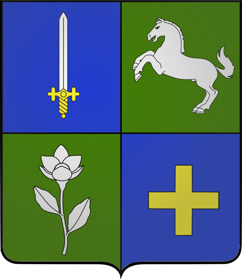 Blason Jean Léonor Le Marois